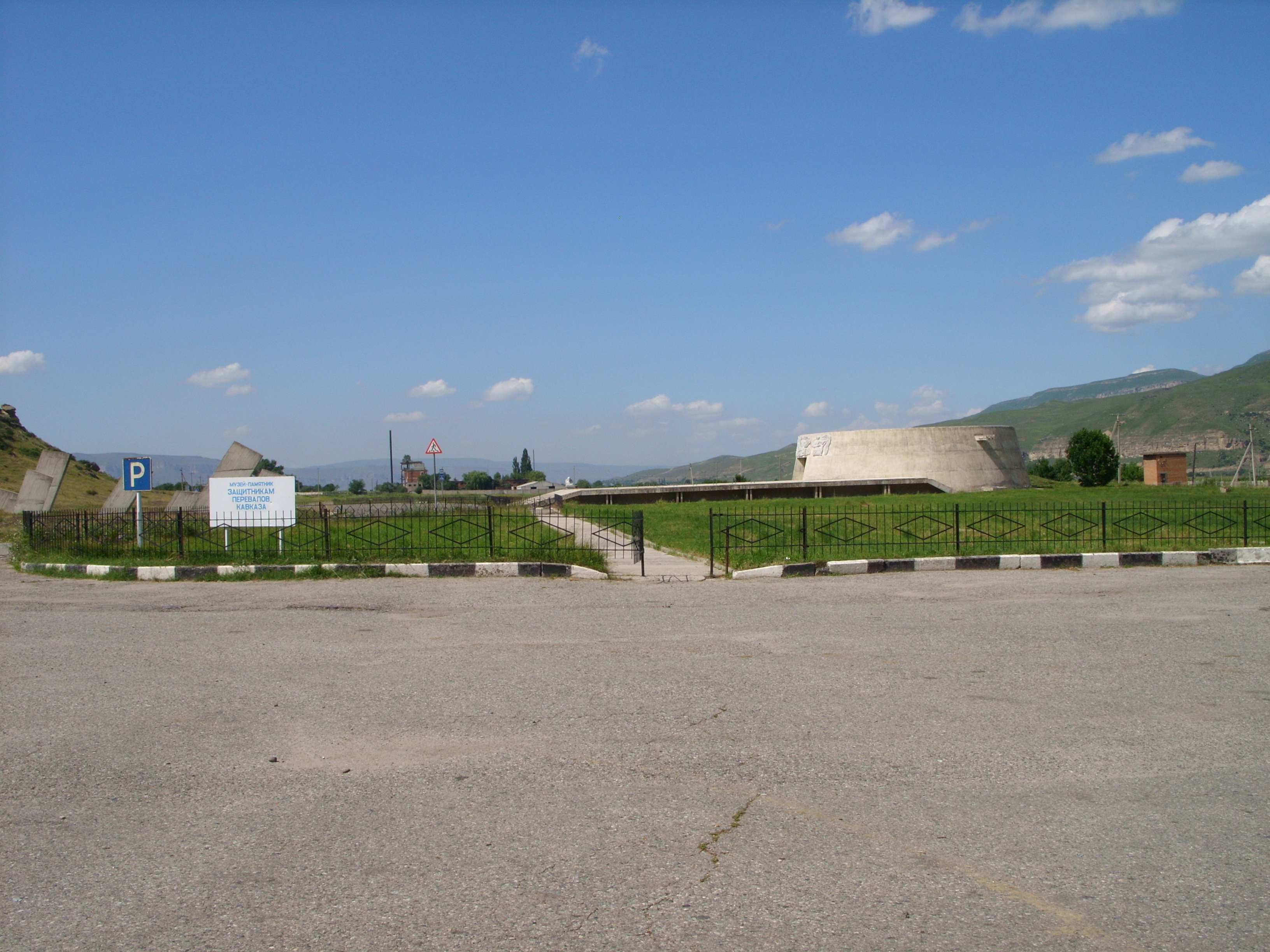 Экскурсия в Домбай из Железноводска, июль 2009 г. Фото с перевала Гумбаши и некоторых др. мест в Карачаевском районе Карачаево-Черкесии сделаны по дороге на Домбай и на обратном пути.